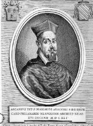 Il Cardinale Ascanio Filomarino, incisione tratta da Araldica vaticana .